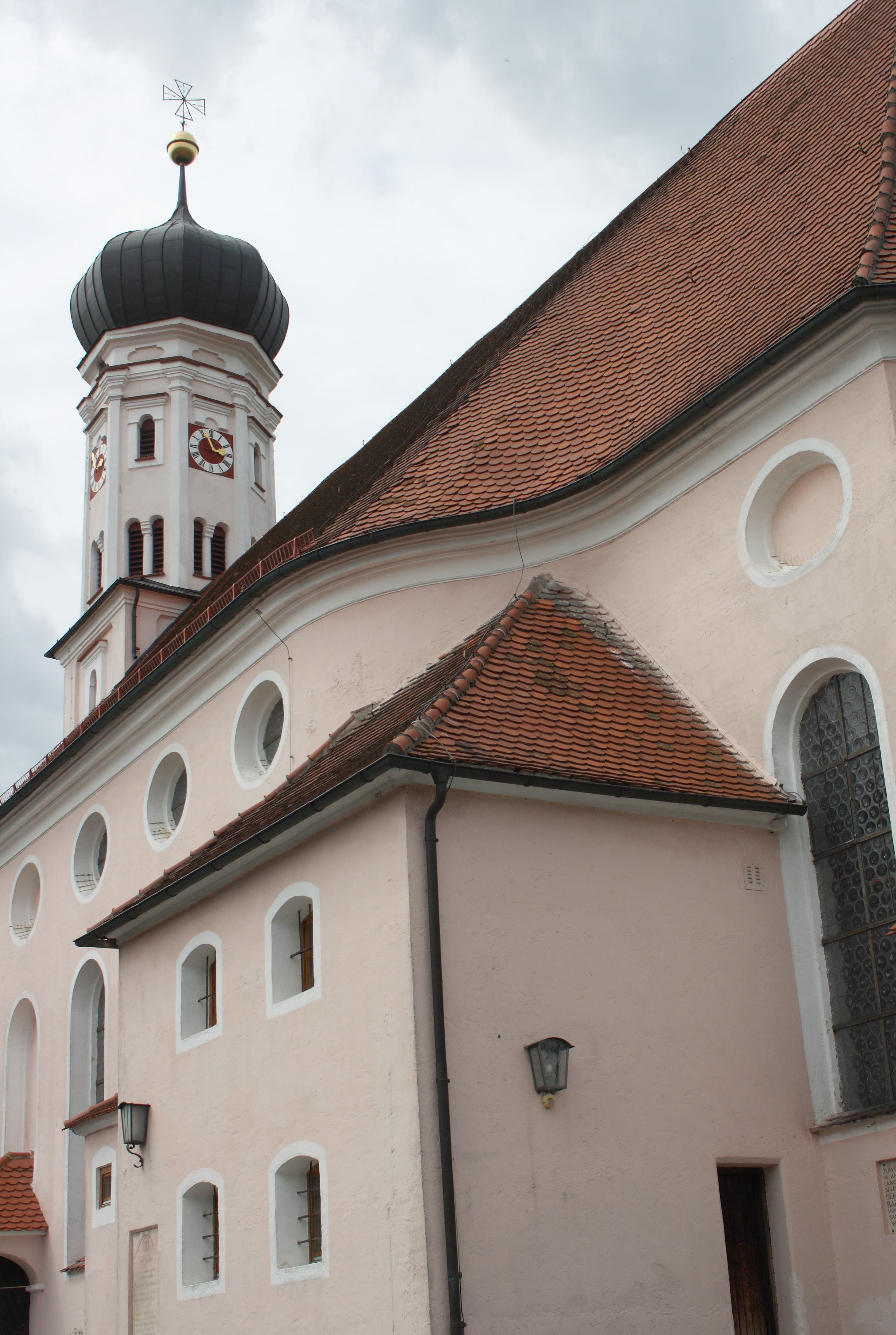 Katholische Pfarrkirche St. Stephan in Häder, einem Ortsteil von Dinkelscherben im Landkreis Augsburg (Bayern)